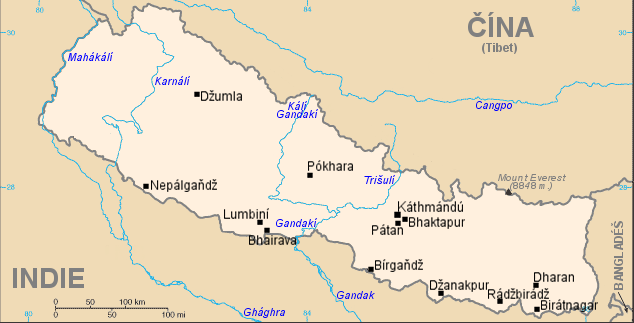 Orientační mapa Nepálu.